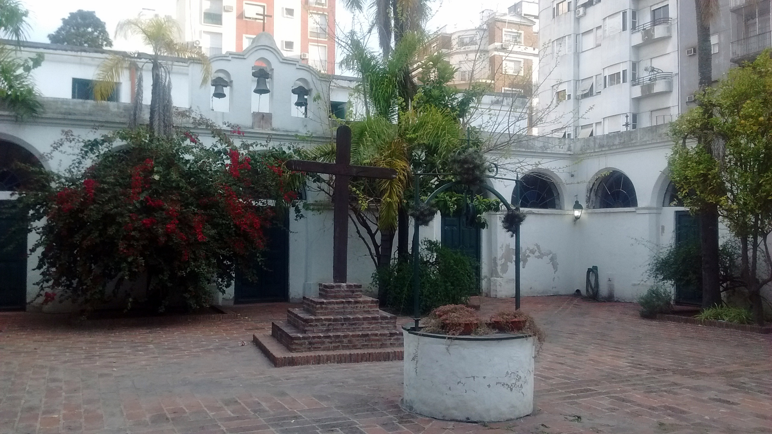 El Museo de la Santa Casa de Ejercicios Espirituales de Sor María Antonia de la Paz y Figueroa, se halla en Avenida Independencia 1190, Constitución, Ciudad de Buenos Aires, Argentina.